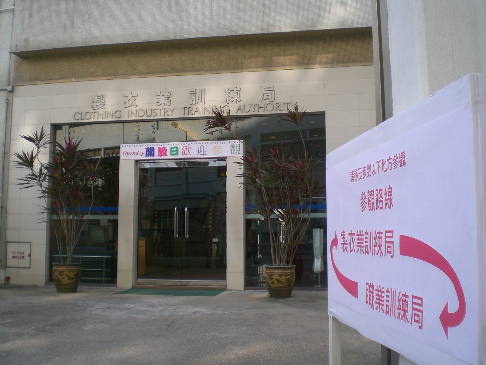 製衣業訓練局牛頭角大業街九龍灣訓練中心開放日